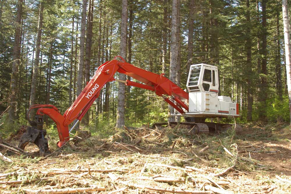 Link-belt 4300 log loader